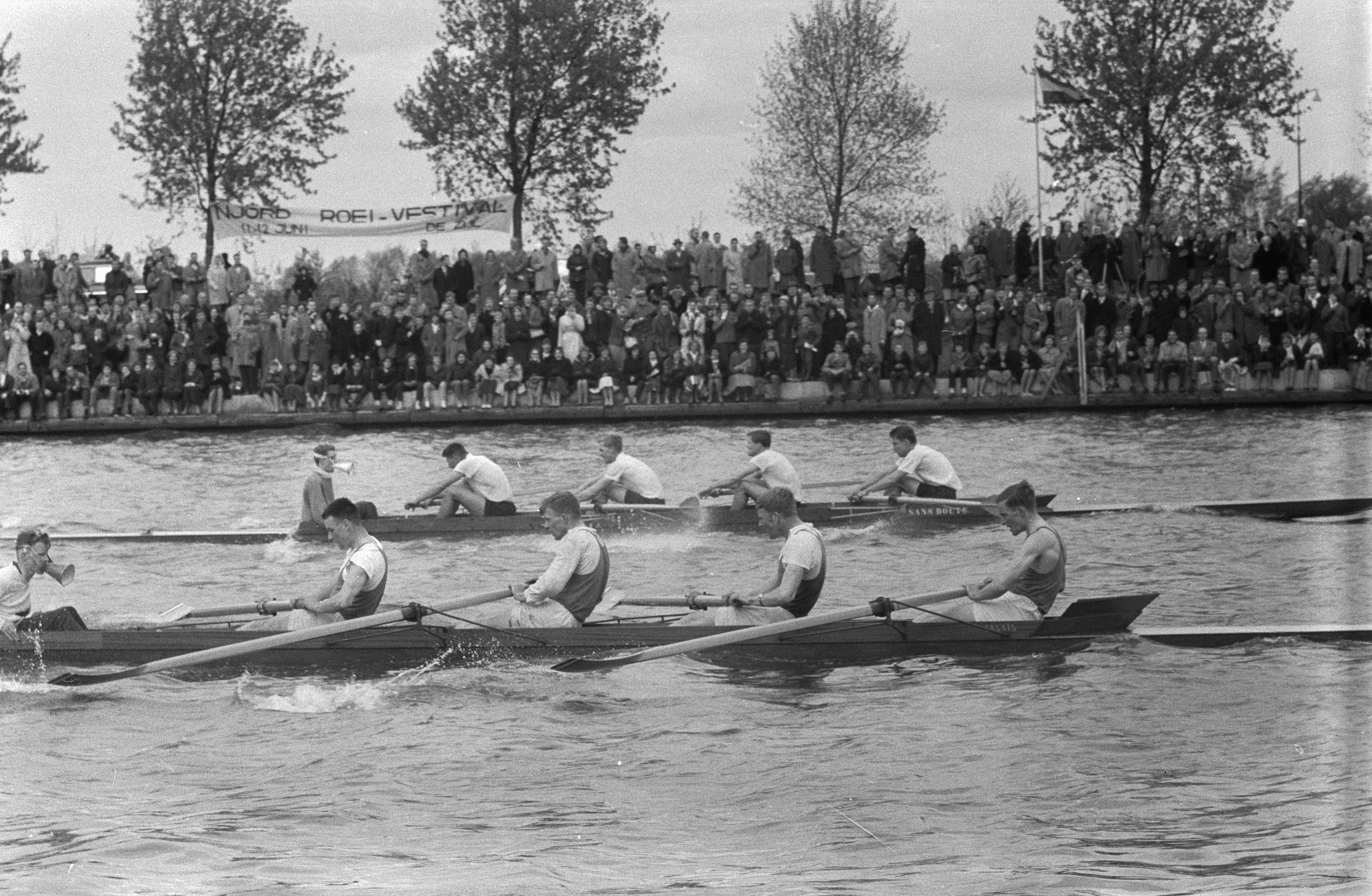 Collectie / Archief : Fotocollectie Anefo Reportage / Serie : [ onbekend ] Beschrijving : Jaarlijkse Varsity bij Jutphaas Datum : 1 mei 1960 Locatie : Jutphaas Trefwoorden : roeiers Instellingsnaam : Varsity Fotograaf : Pot, Harry / Anefo Auteursrechthebbende : Nationaal Archief Materiaalsoort : Negatief (zwart/wit) Nummer archiefinventaris : bekijk toegang 2.24.01.05 Bestanddeelnummer : 911-2061